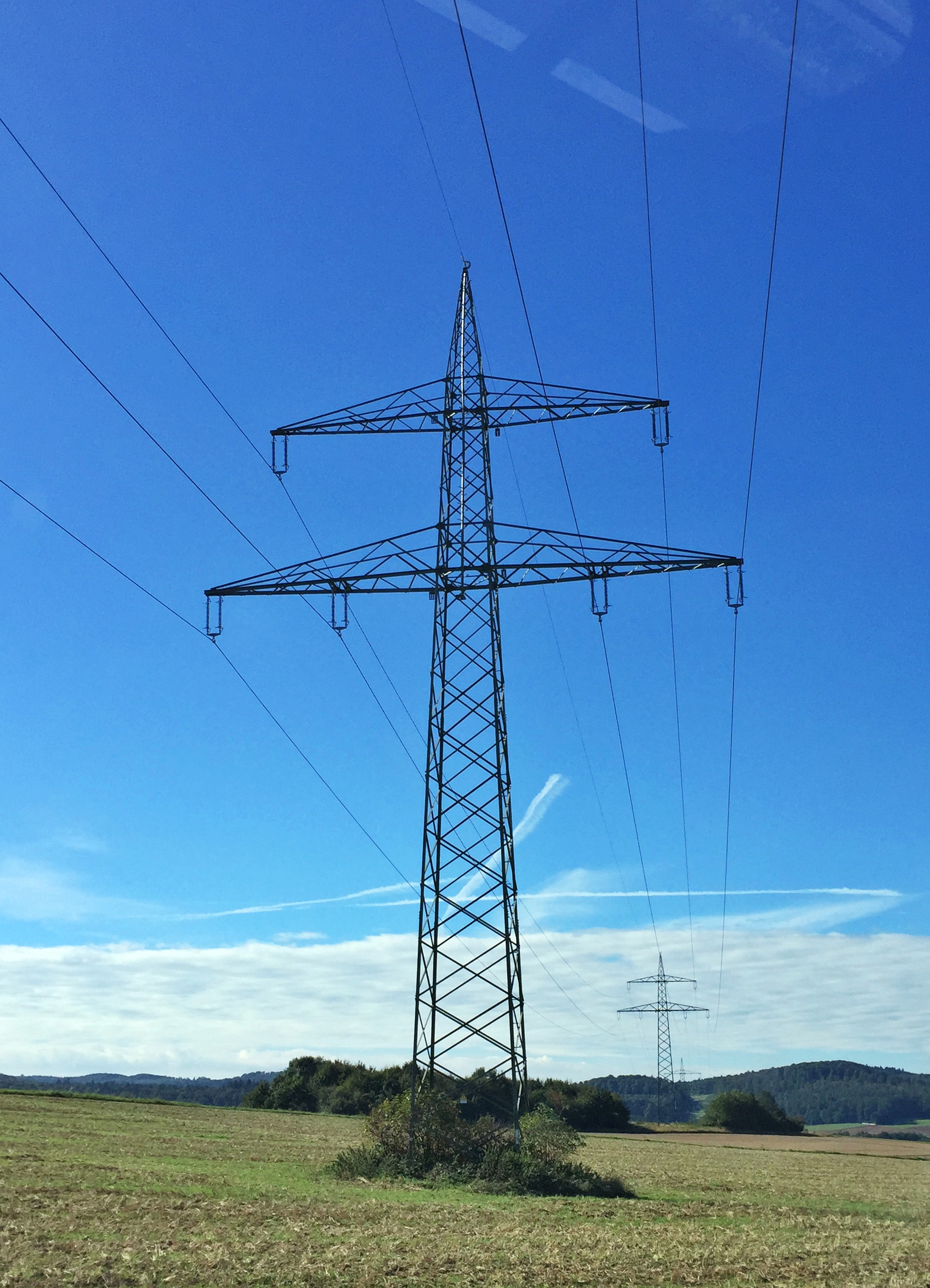 Die 110-kV-Leitung Borken–Lauterbach quert in Alsfeld (zwischen Berfa und Eifa) die A 5. Sie verläuft auf den Masten der ehemaligen 220-kV-Leitung Borken–Aschaffenburg aus dem Jahre 1949.